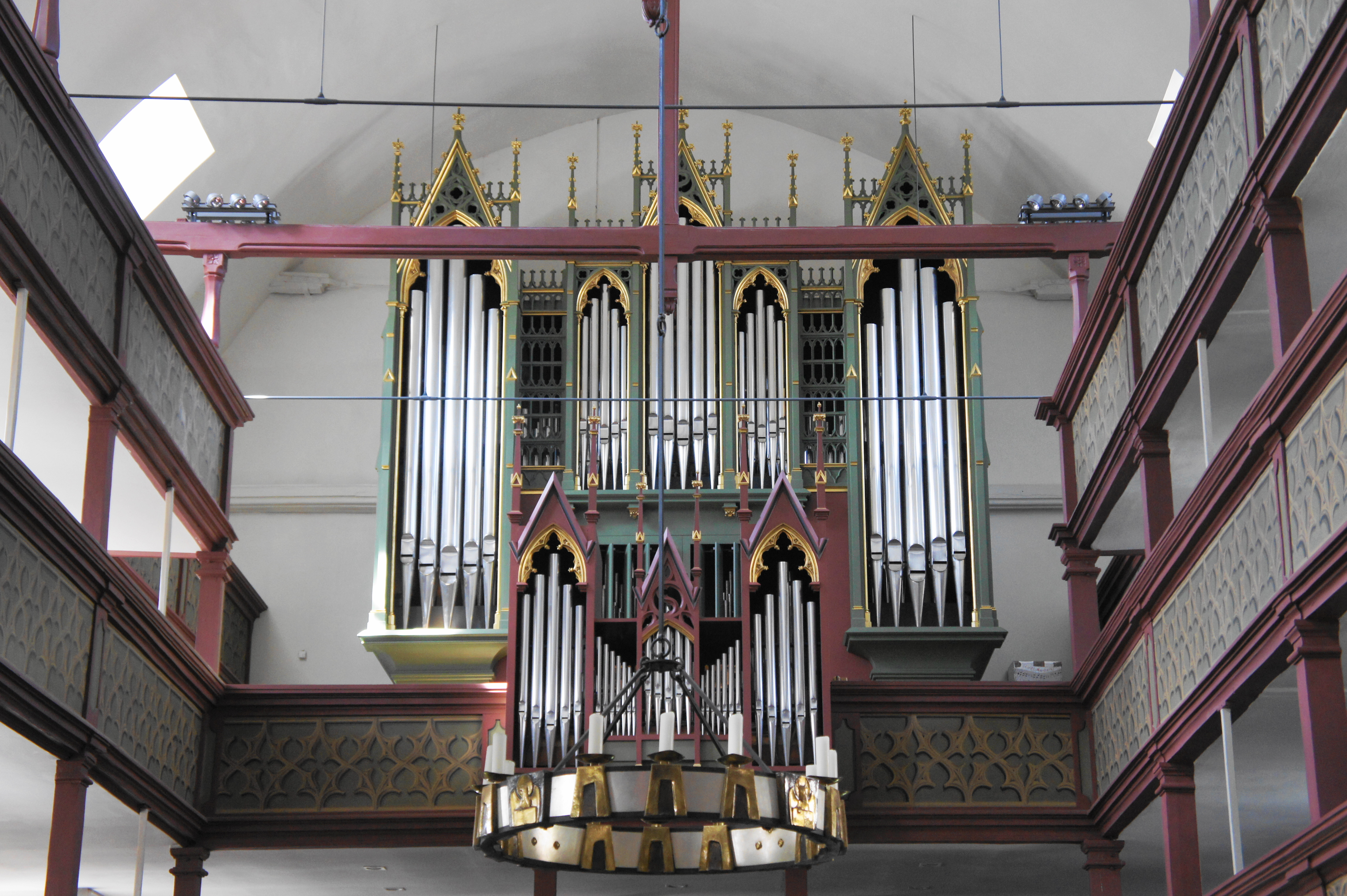 Evangelisch-Lutherische Kirche St. Michael in Fürth. Anfänge stammen aus der Zeit um 1100, sie ist die älteste existierende Kirche in Fürth. Die Orgel (mechanische Traktur) 1979 durch die Fa. Orgelbauwerkstatt Simon, Landshut errichtet, umfaßt 45 klingende Register, verteilt auf 3 Manuale und Pedal (Rückpositiv, Hauptwerk, Schwellwerk)